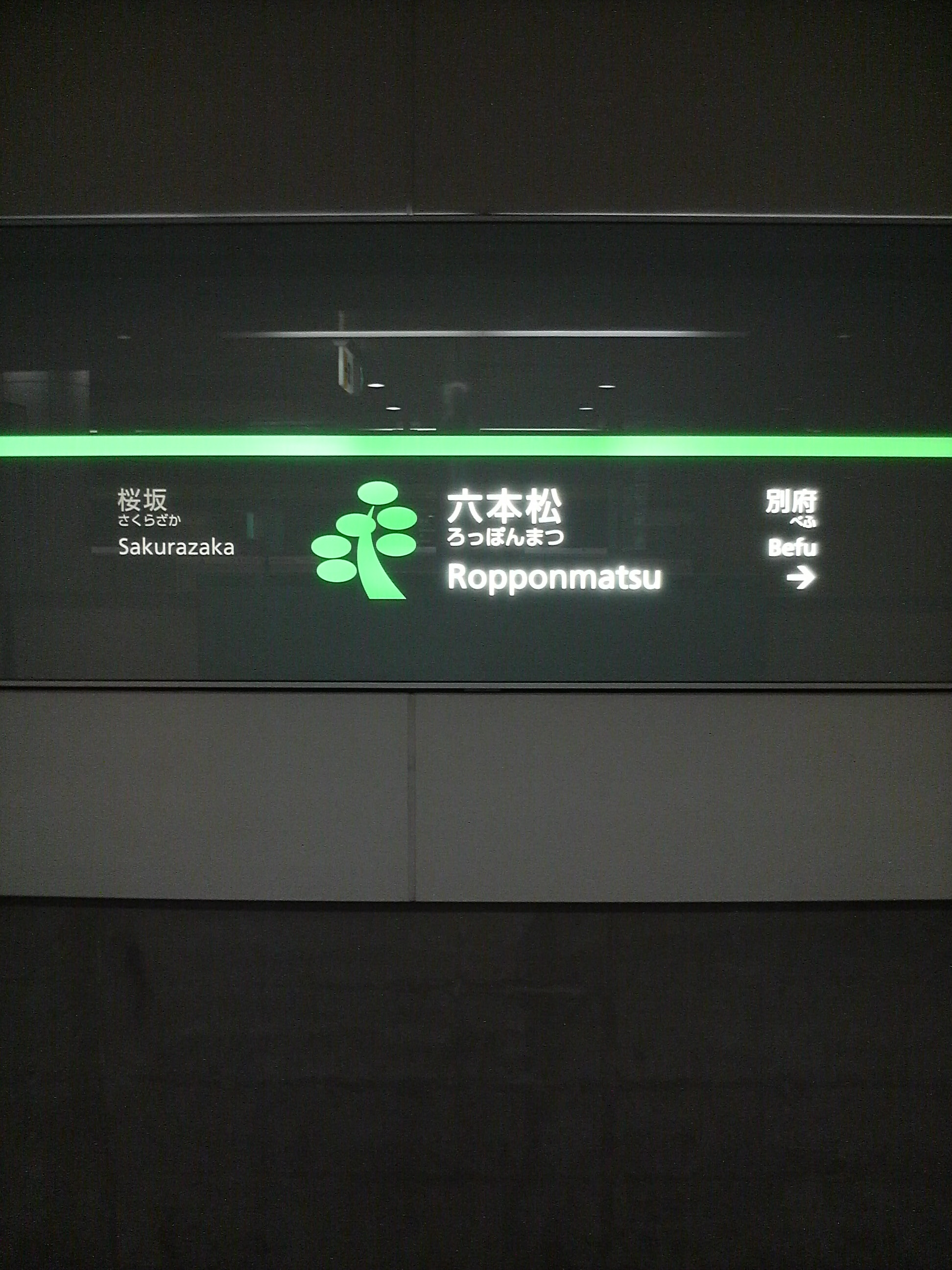 福岡市地下鉄七隈線六本松駅の駅名標